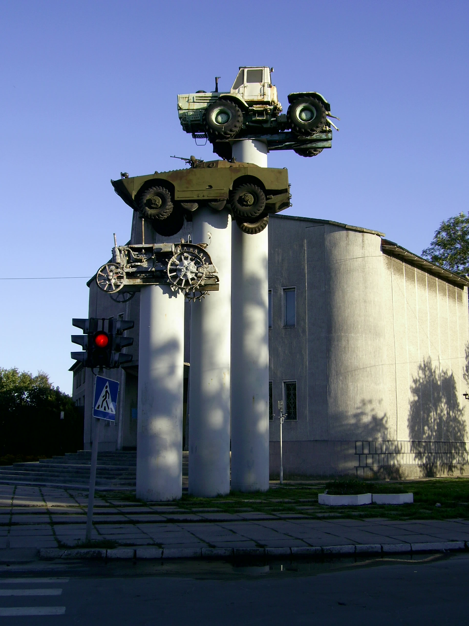 Хмельницька обл. Славута. Автомобілі